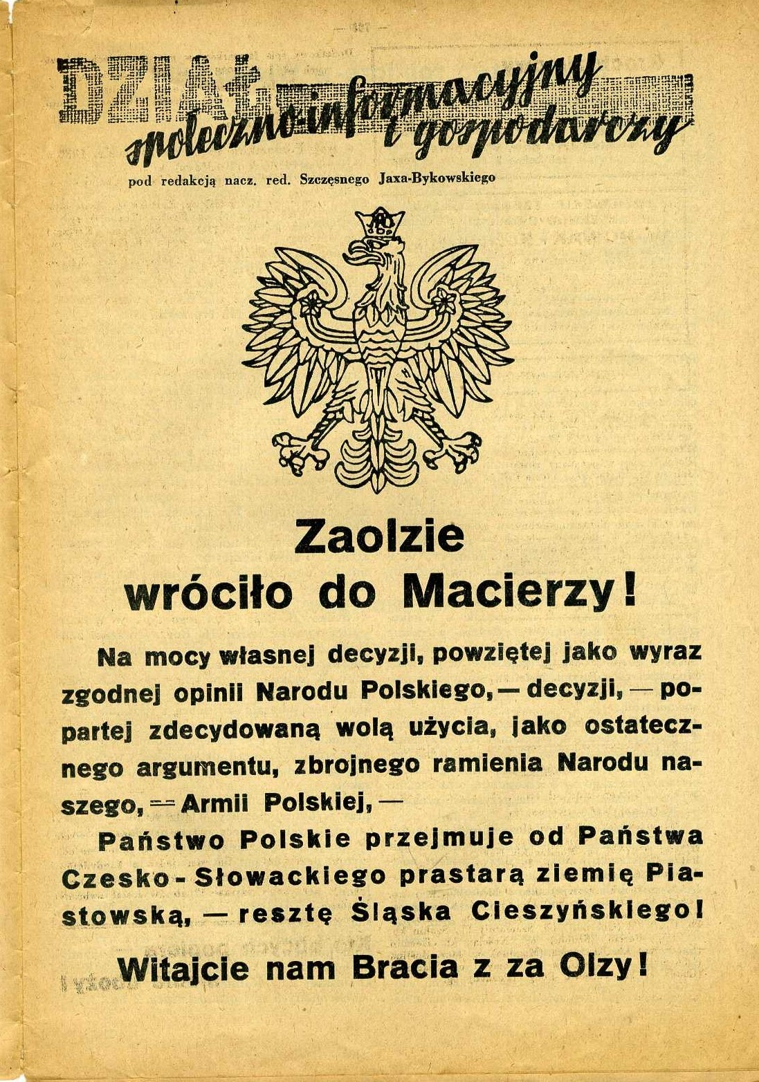 Strona z Poradnika Gospodarskiego z informacją o przejęciu Zaolzia przez Wojsko Polskie w 1938 roku.